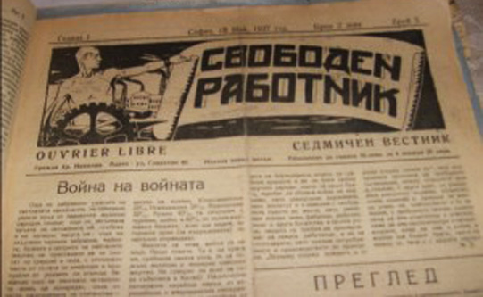 Вестник "Свободен работник" е печатан в София и от него излизат 49 броя. Редактори са Христо Табаков, а след неговото арестуване, Георги Ковачев.